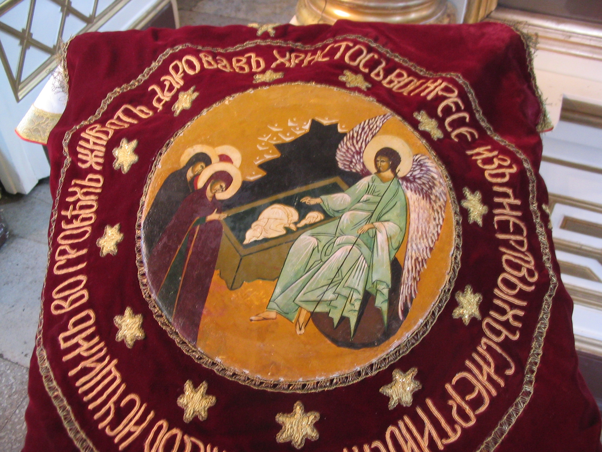 Ortodoksinen pääsiäisleipä pussissaan kirkossa